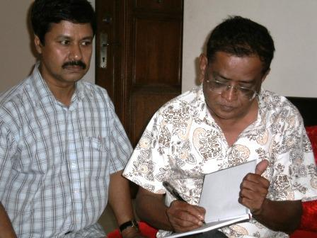 হুমায়ূন আহমেদ ও তার প্রকাশক আহমেদ মাহমুদুল হক (মাওলা ব্রাদার্স)।